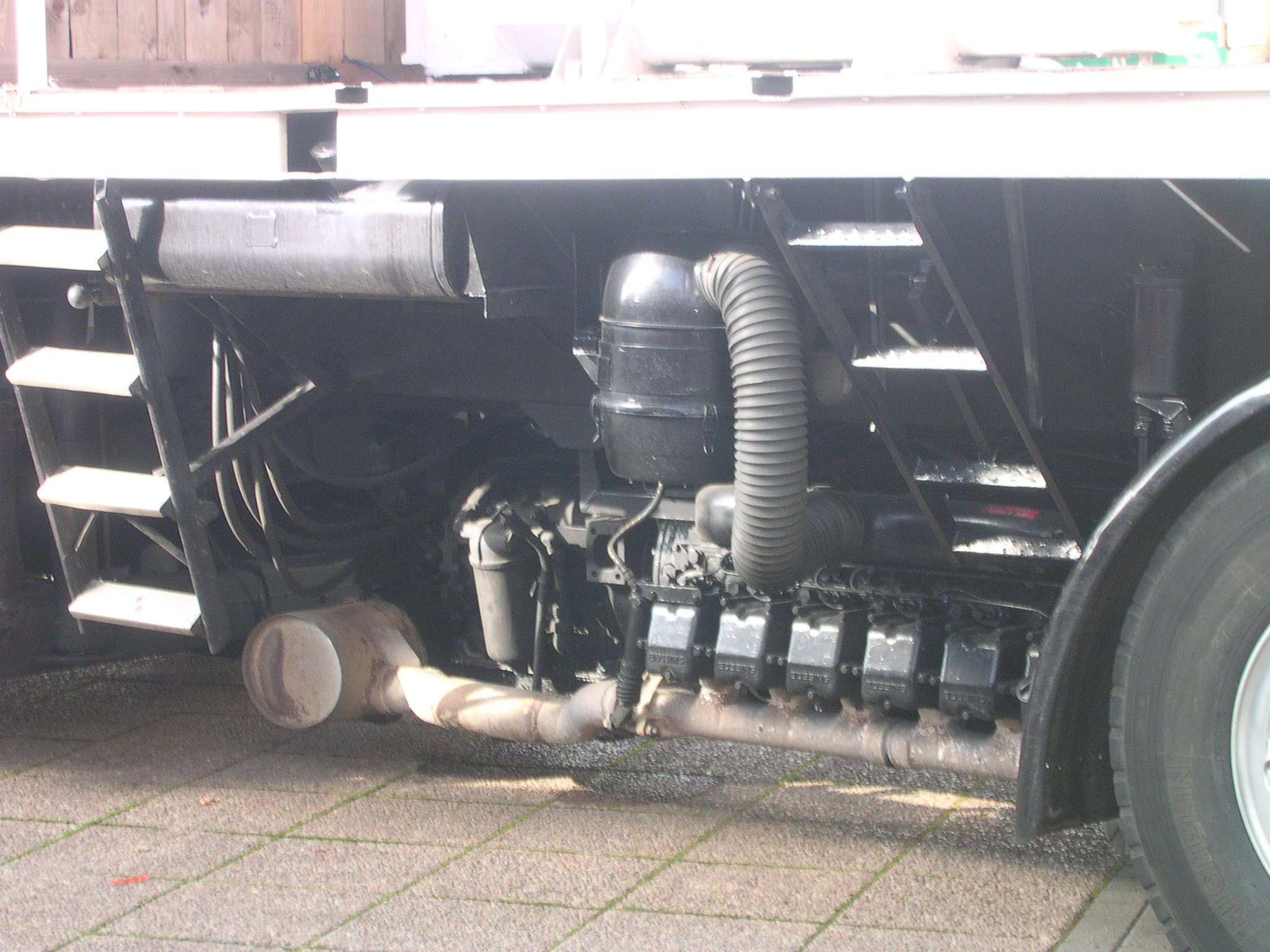 Nutzfahrzeug-IAA 2004 in Hannover, Büssing 22-150 Decklaster, Baujahr 1965, 110 kW (150 PS), vmax 80 km/h, Länge 10,32 m, Gewicht 7300 kg.